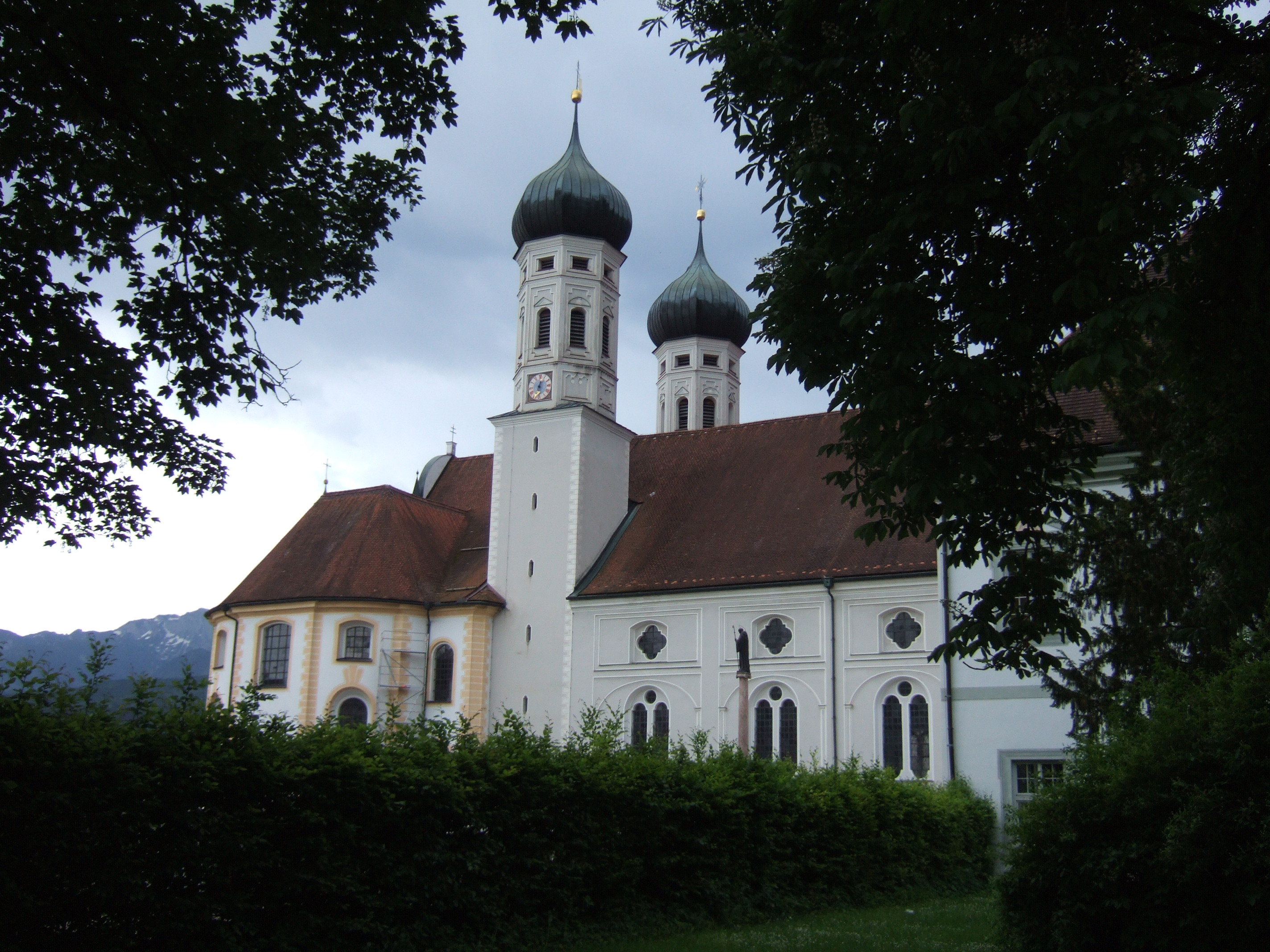 Kloster Benediktbeuern von Norden